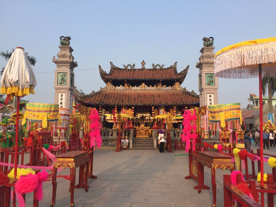 Phu Chinh Tien Huong.jpg